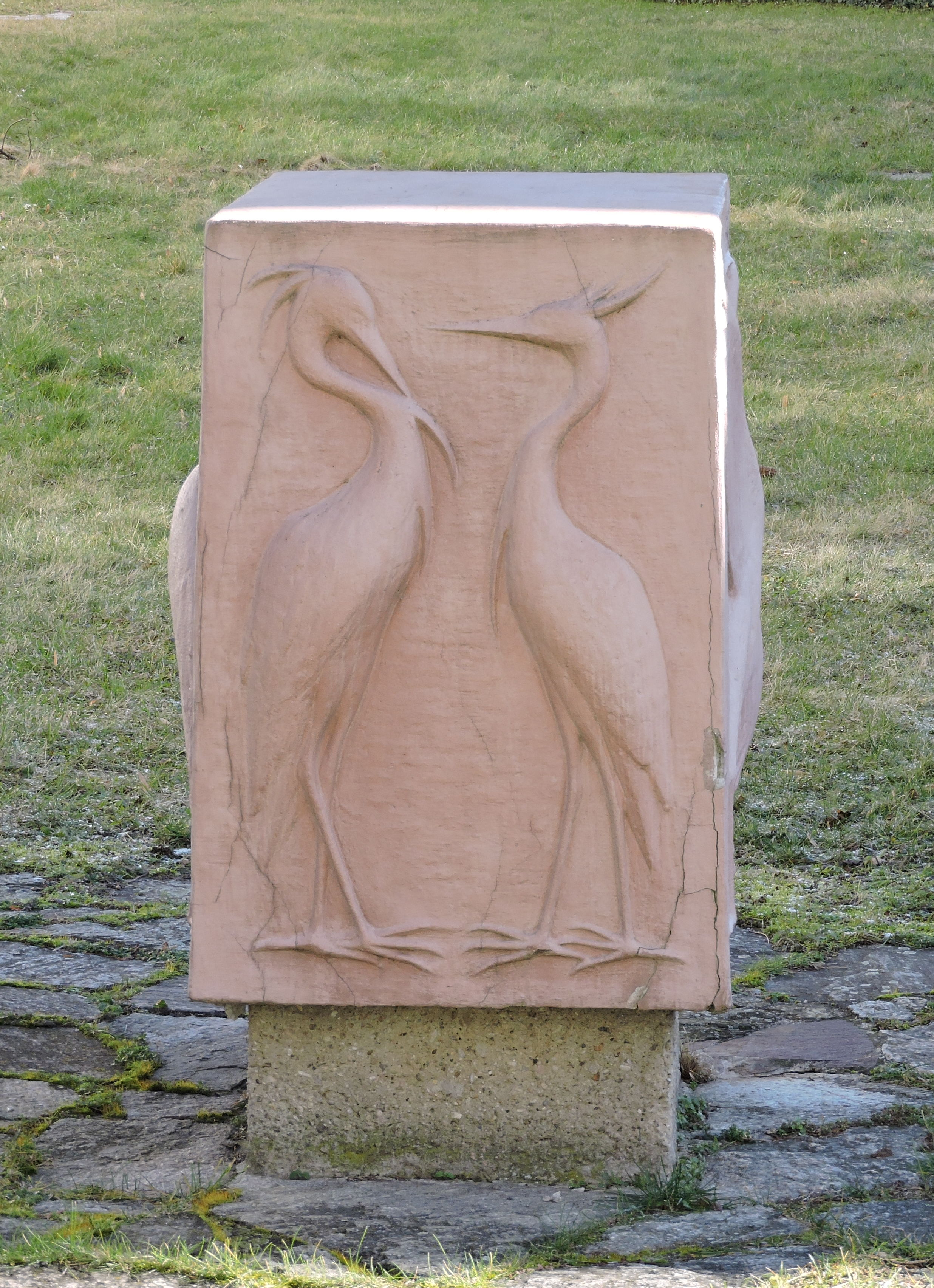 Kubus mit 4 Darstellungen "Wasservögel"